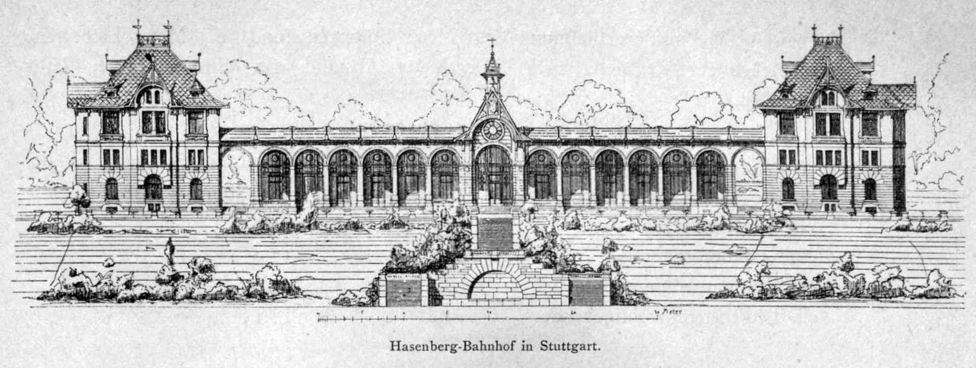 Nicht realisierter Entwurf für den Hasenberg-Bahnhof in Stuttgart (Westbahnhof), 1890.